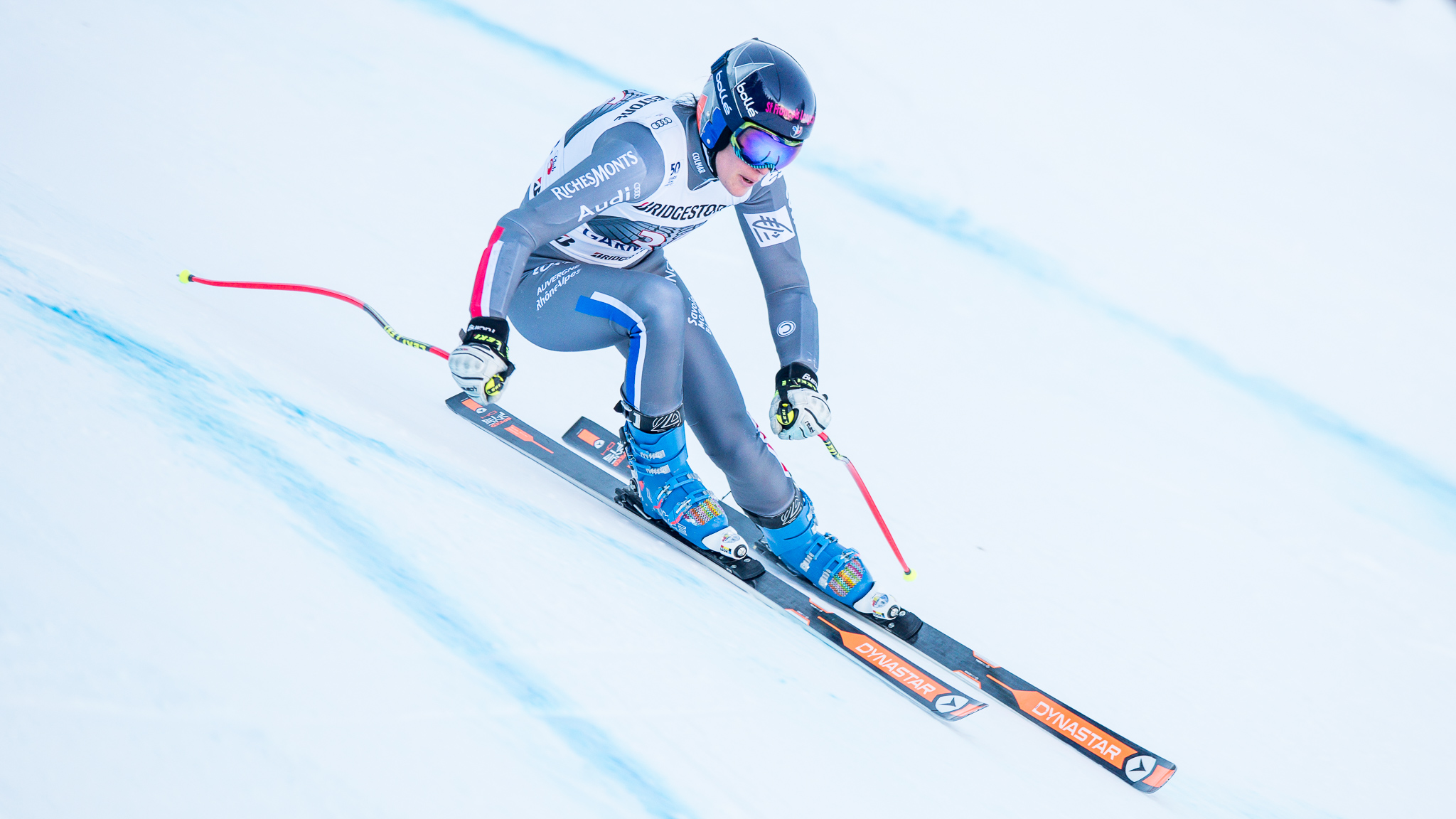 64. Kandahar Rennen,Audi FIS Ski Weltcup Garmisch-Partenkirchen,Damen Abfahrt,Kandahar,Ladies Downhill,Marion Pellissier